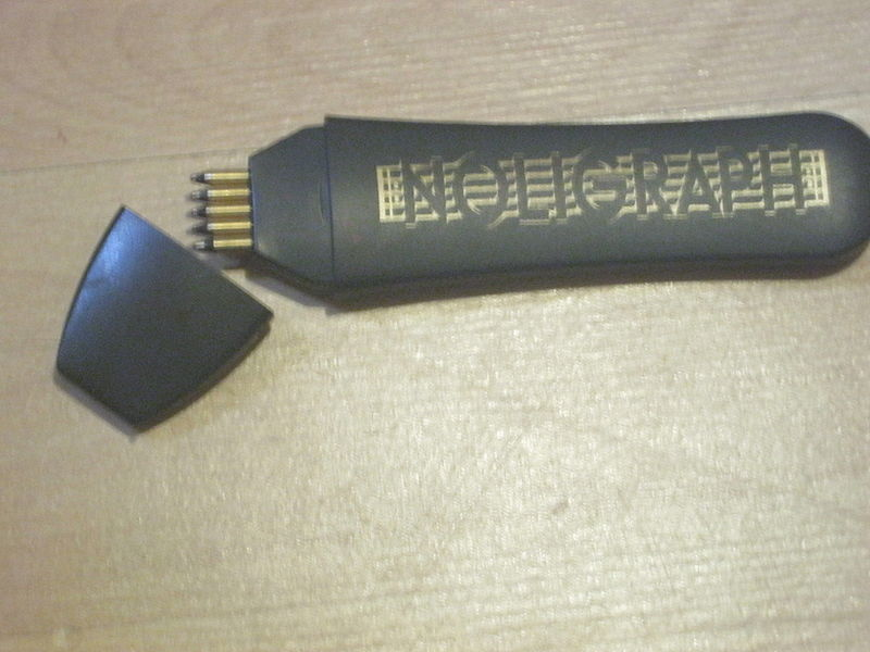 עט לכתיבת חמשות (במוזיקה)